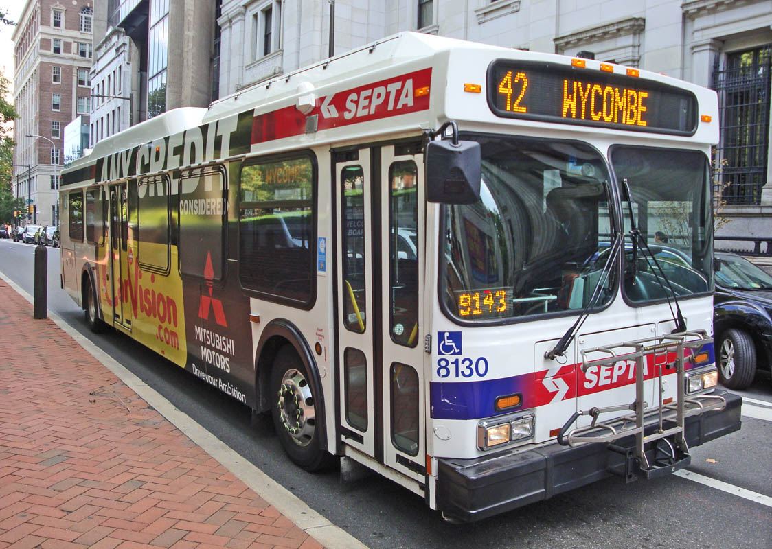 Автобус New Flyer DE41LF, принадлежащий транспортному управлению юго-восточной Пенсильвании - в Филадельфии.